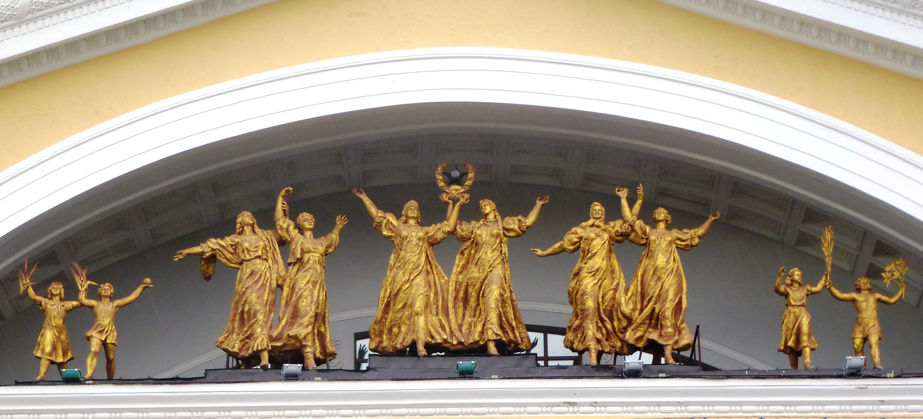 Скульптурная группа "Дружба" . Автор - С. Т. Конёнков. Открыта в марте 1955 года на здании Государственного музыкально-драматического театра Карело-Финской ССР в Петрозаводске.